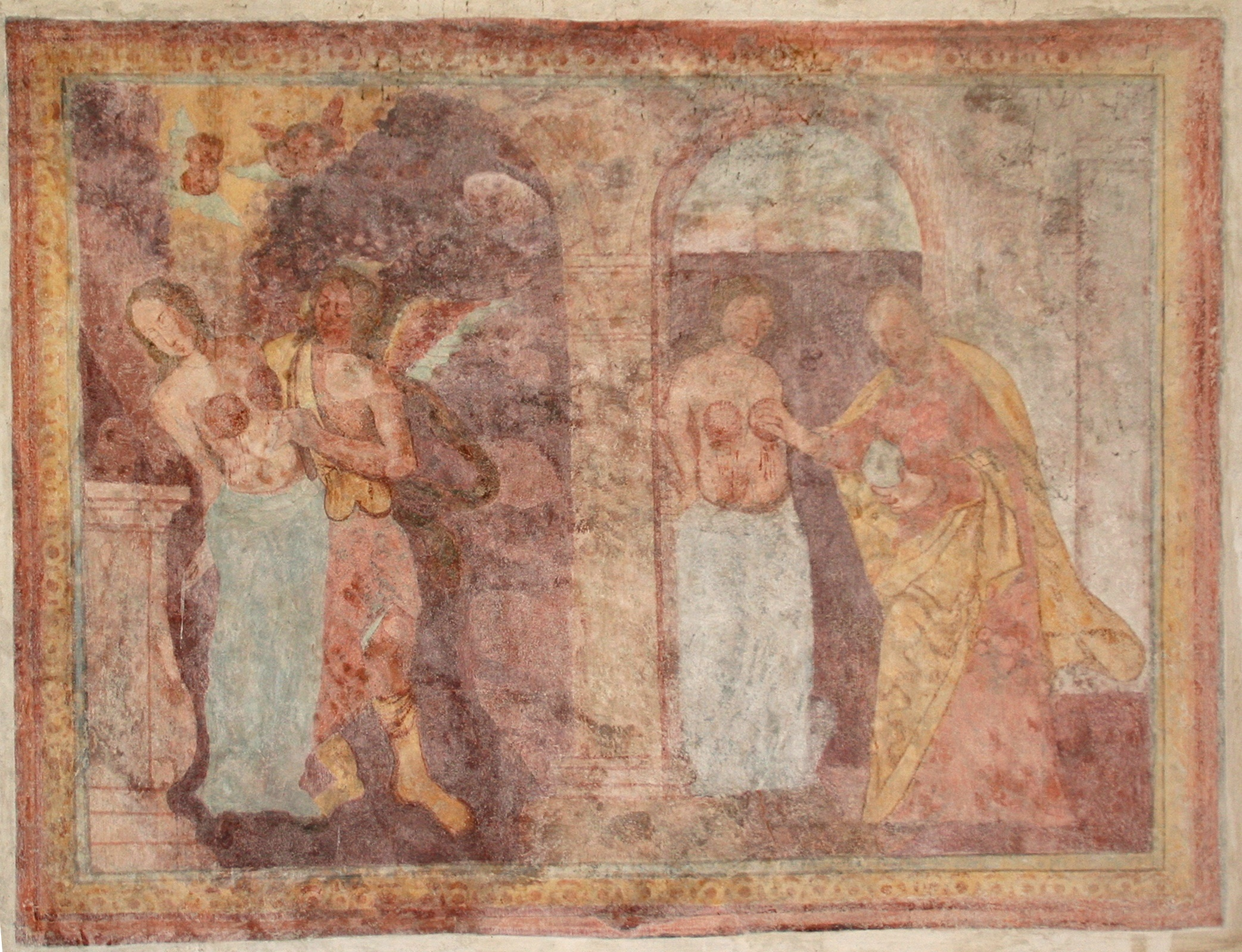 Kapelle St. Agatha Disentis Martyrium